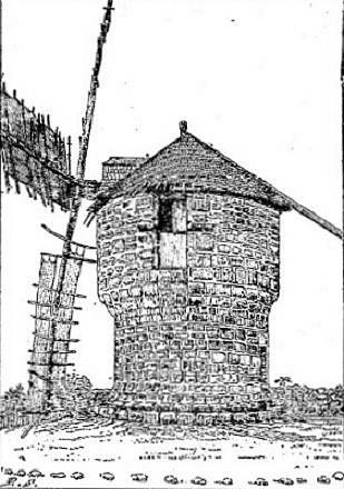 Moulin fortifié de Plouharnel vers 1890-1900 (dessin non signé)